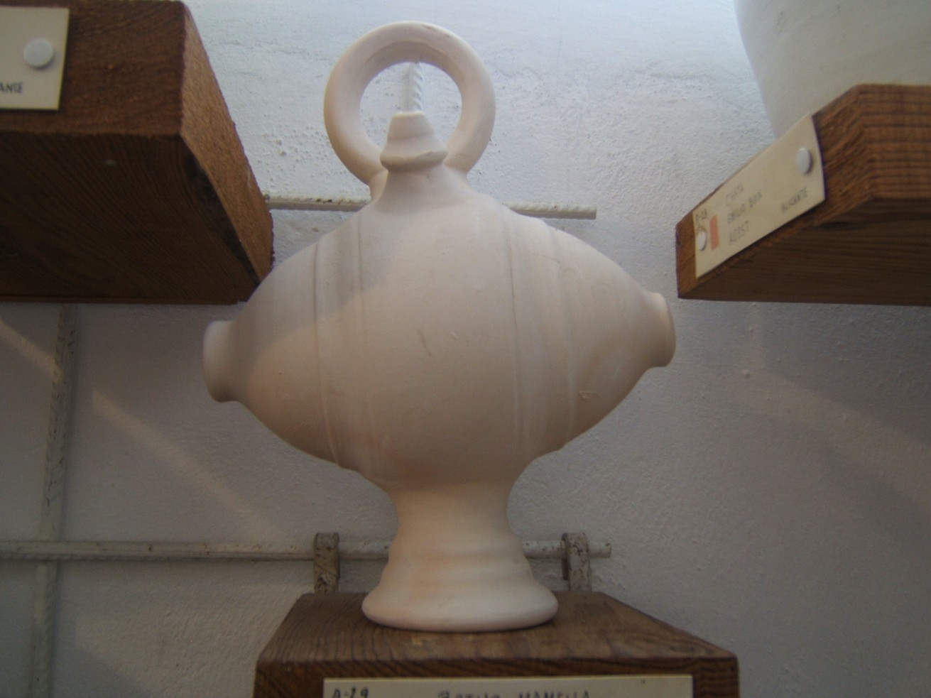 Botillo de 'mamella', alfarería tradicional de Agost (Alicante, España).